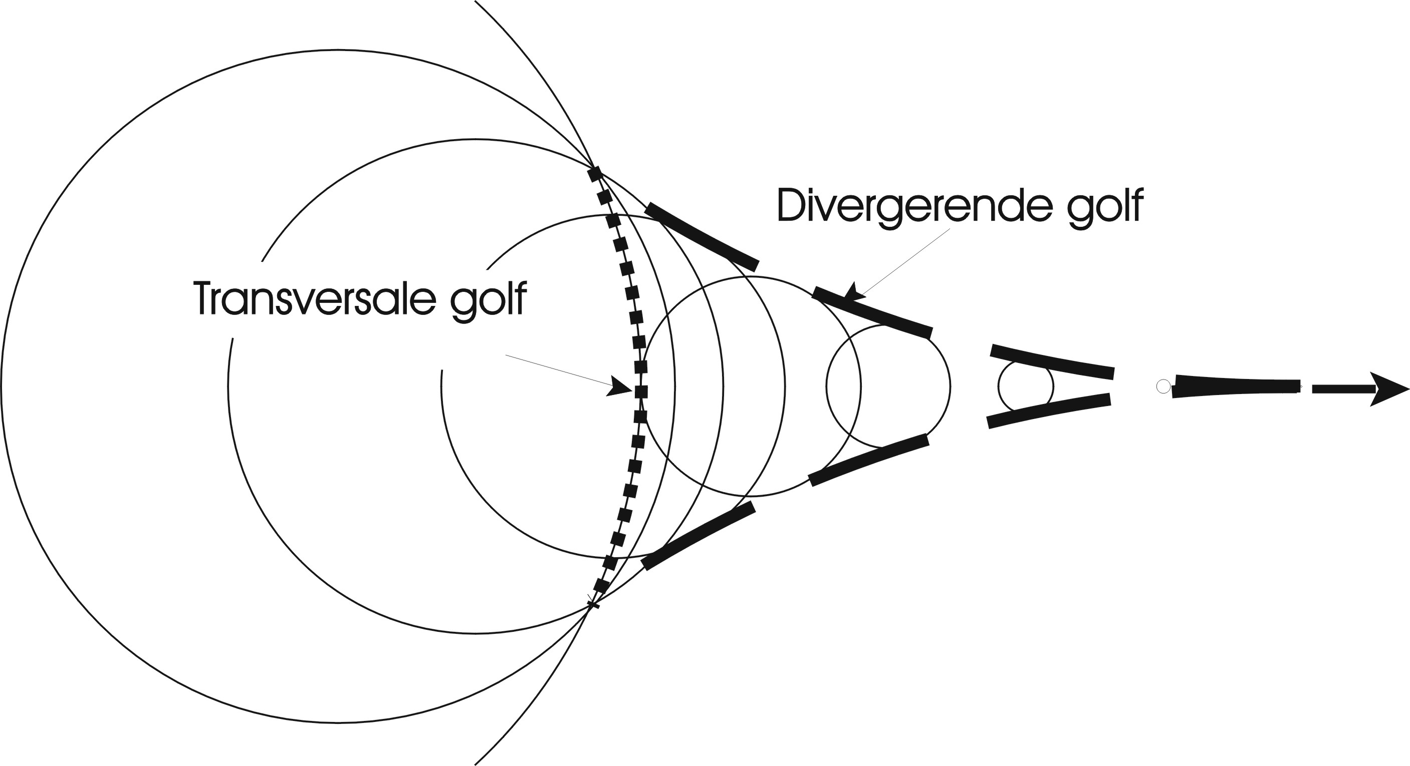 Ontstaan van Kelvingolven achter een schip door een verplaatsend drukpunt